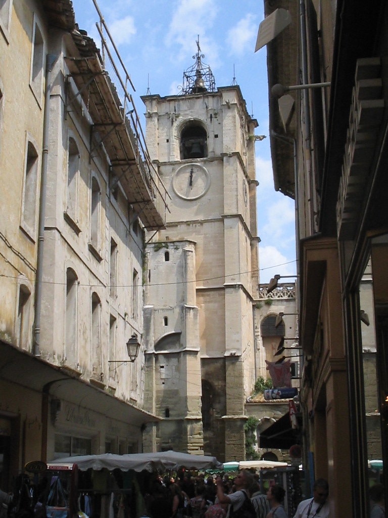 village L'Isle sur la Sorgue, Vaucluse, june 2005